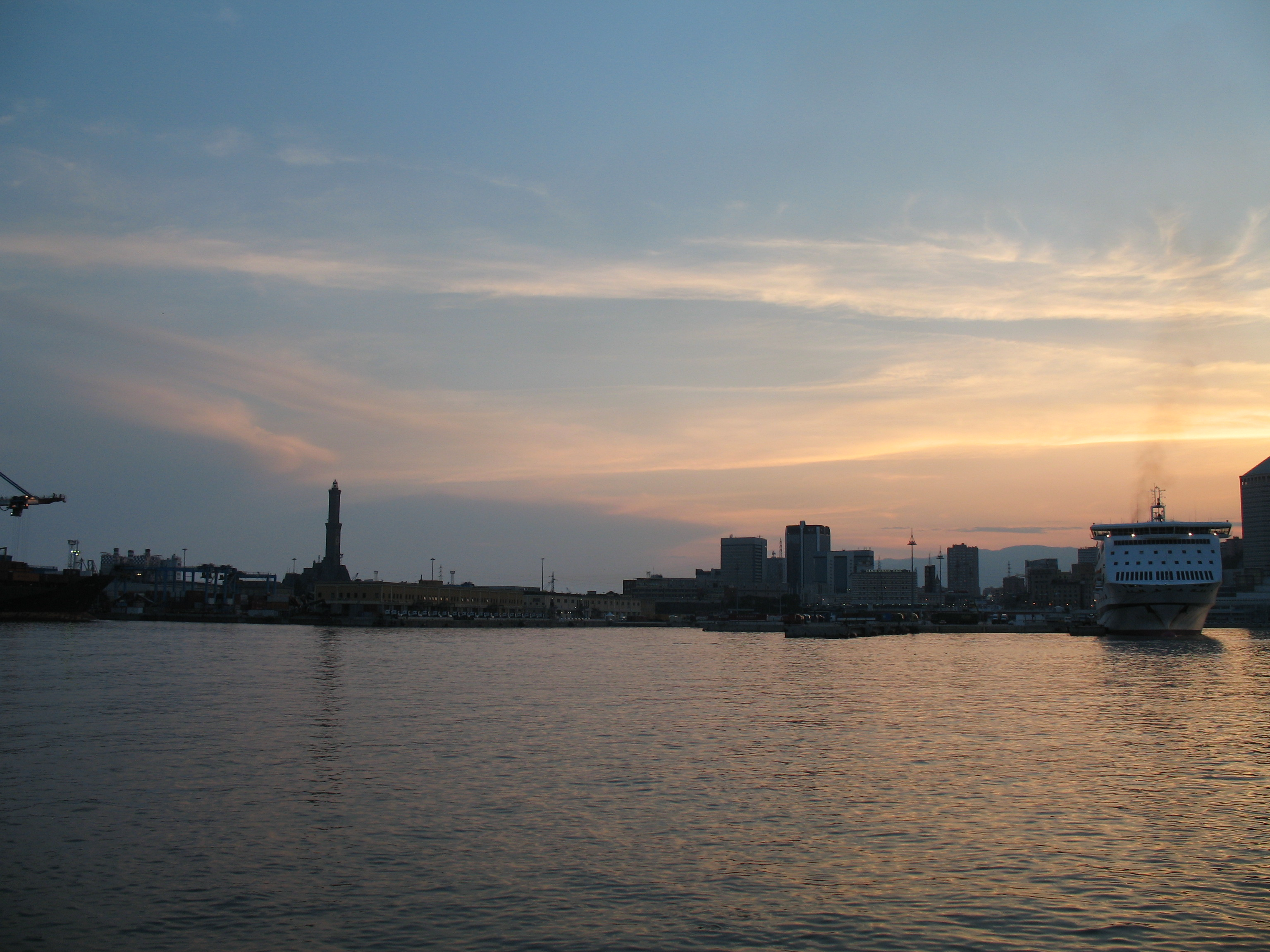 Genova - porto antico Panorama del porto antico - la Lanterna